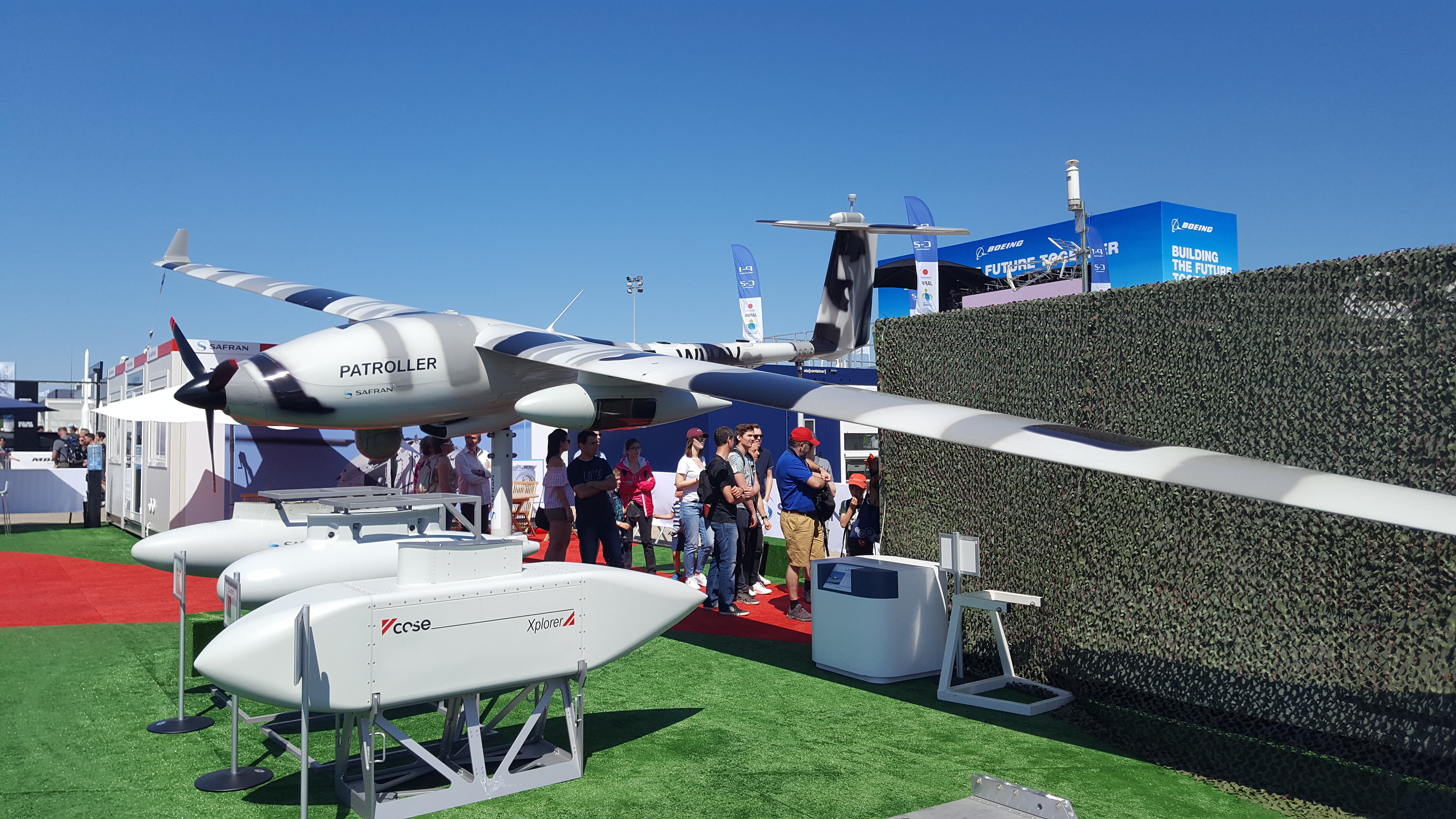 Safran Patroller au salon du Bourget 2019